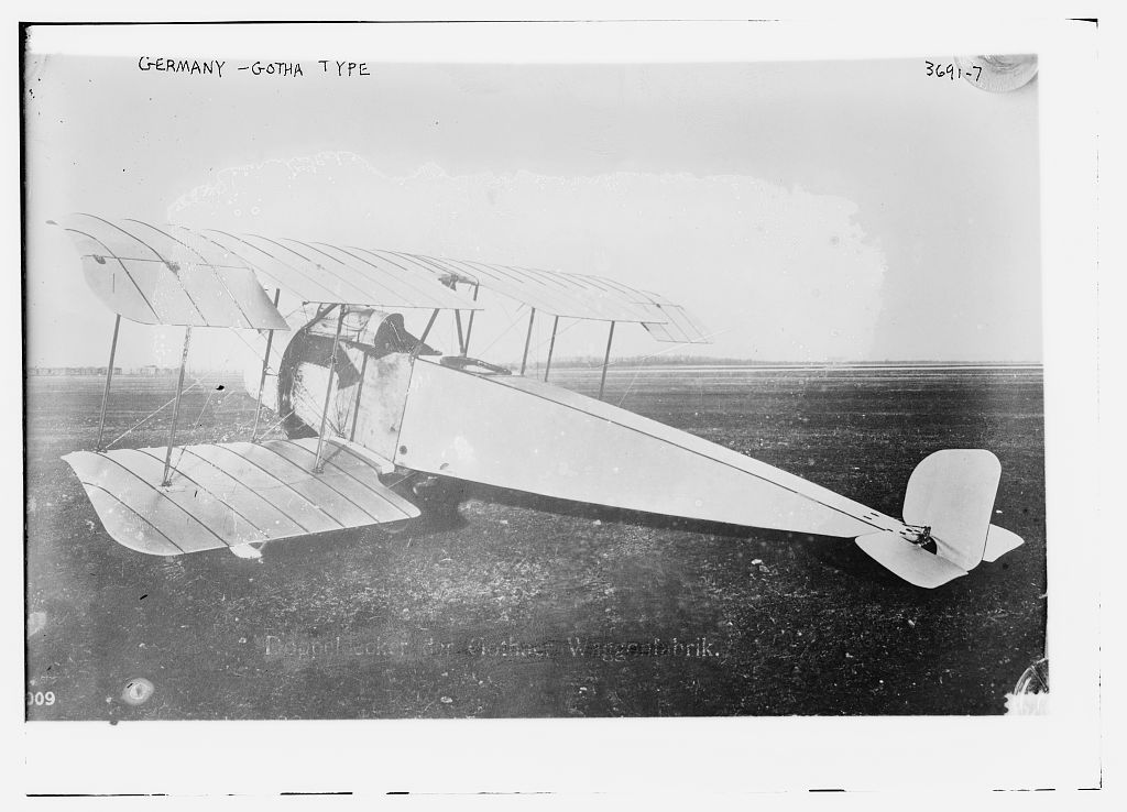 Doppeldecker LD-5 der Gothaer Waggonfabrik TITLE: Ger. -- Gotha Type plane CALL NUMBER: LC-B2- 3691-7[P&P] REPRODUCTION NUMBER: LC-DIG-ggbain-20545 (digital file from original negative) No known restrictions on publication. TITLE: Ger. -- Gotha Type plane MEDIUM: 1 negative : glass ; 5 x 7 in. or smaller. CREATED/PUBLISHED: [no date recorded on caption card] Forms part of: George Grantham Bain Collection (Library of Congress). FORMAT: Glass negatives. REPOSITORY: Library of Congress Prints and Photographs Division Washington, D.C. 20540 USA DIGITAL ID: (digital file from original neg.) ggbain 20545* CARD #: ggb2005020538 MEDIUM: 1 negative : glass ; 5 x 7 in. or smaller.